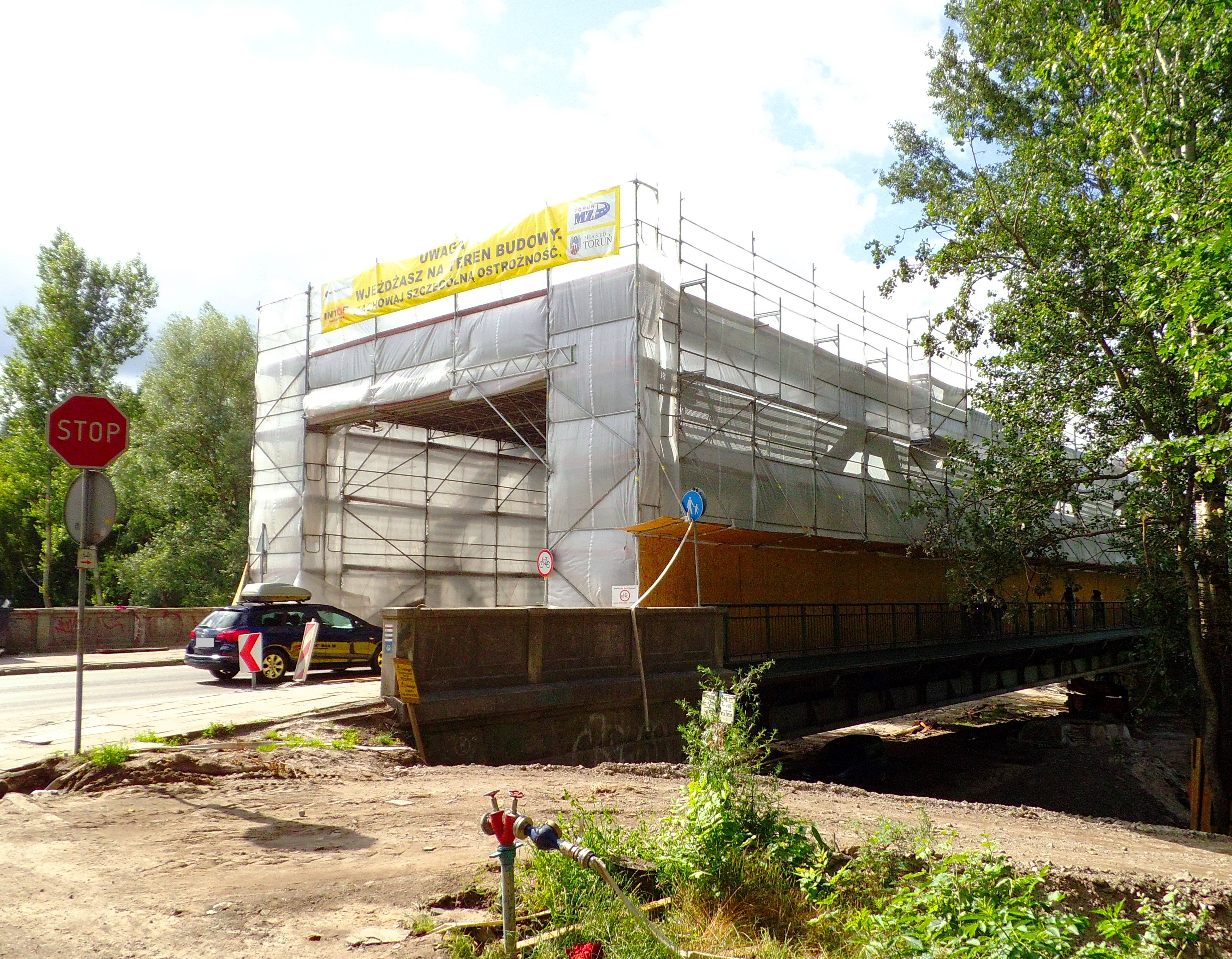 Most drogowy im. Józefa Piłsudskiego w Toruniu2020